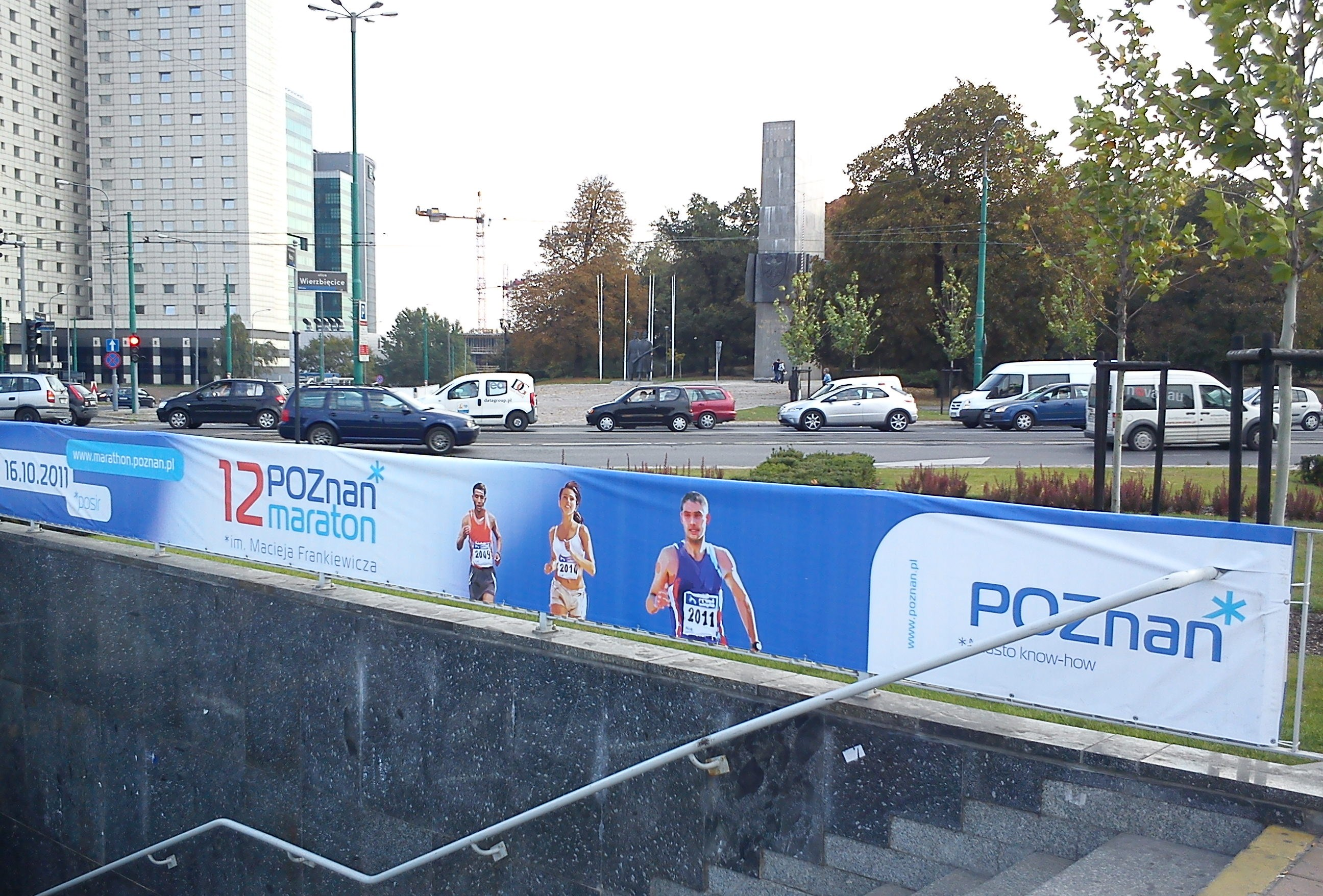 12. Poznań Marathon - 10.2011.